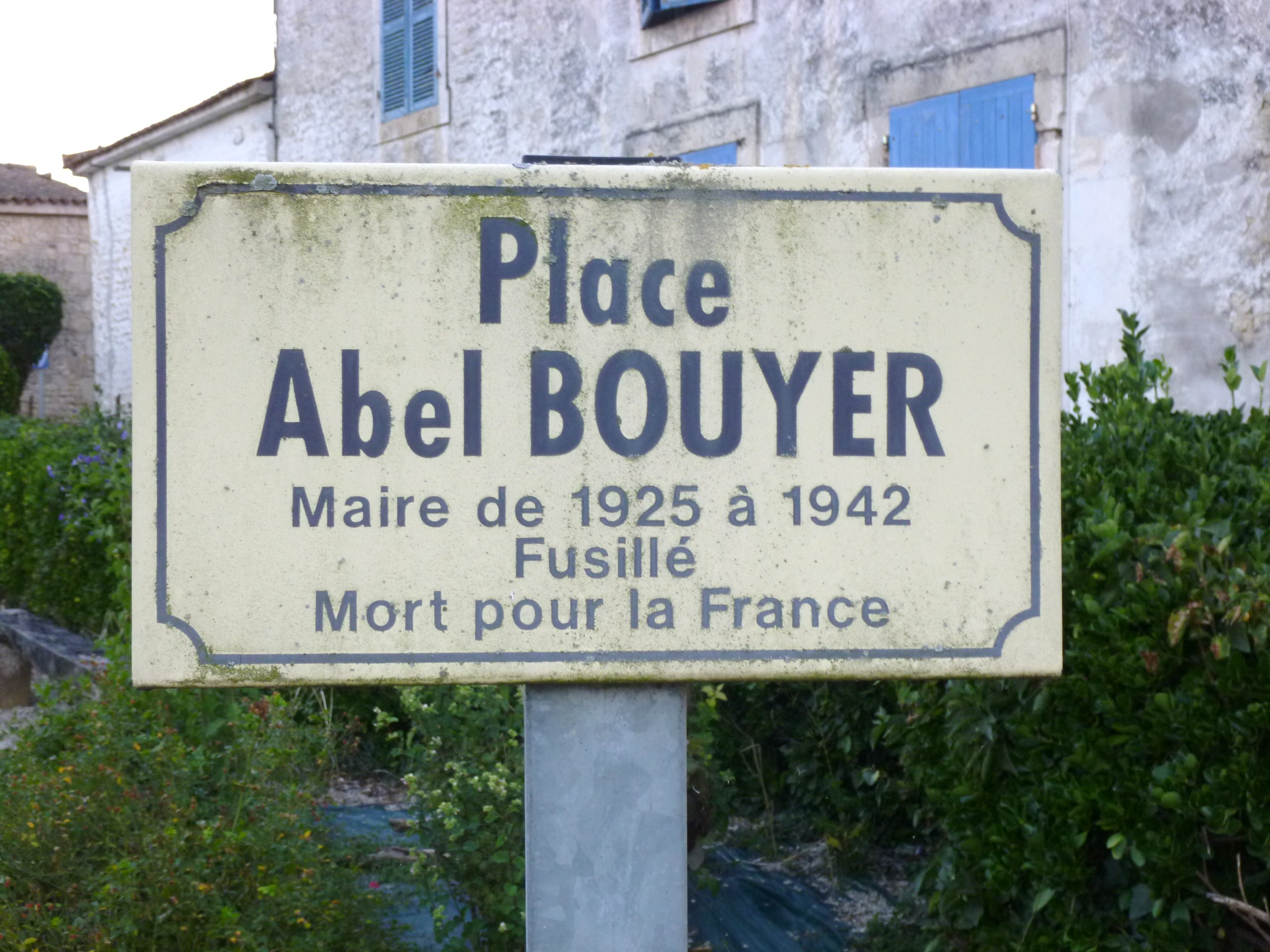 Place Abel Bouyer au Thou Charente Maritime